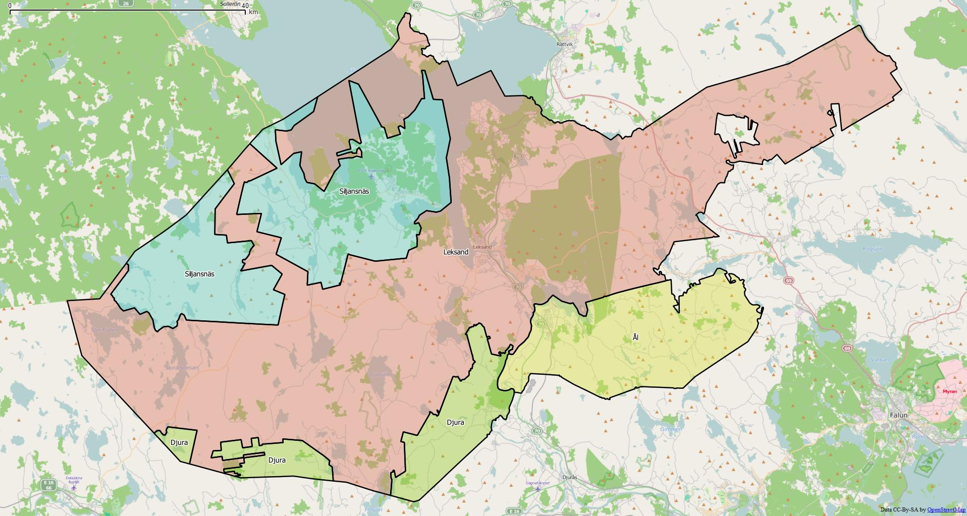 Distriktsindelningen i Leksands kommun World file: 85.73762463239310705 0 0 -85.73762463239310705 1587551.01121698273345828 8606626.64794550836086273